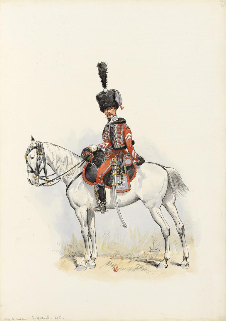 Chef de musique du 3e Hussards en 1806